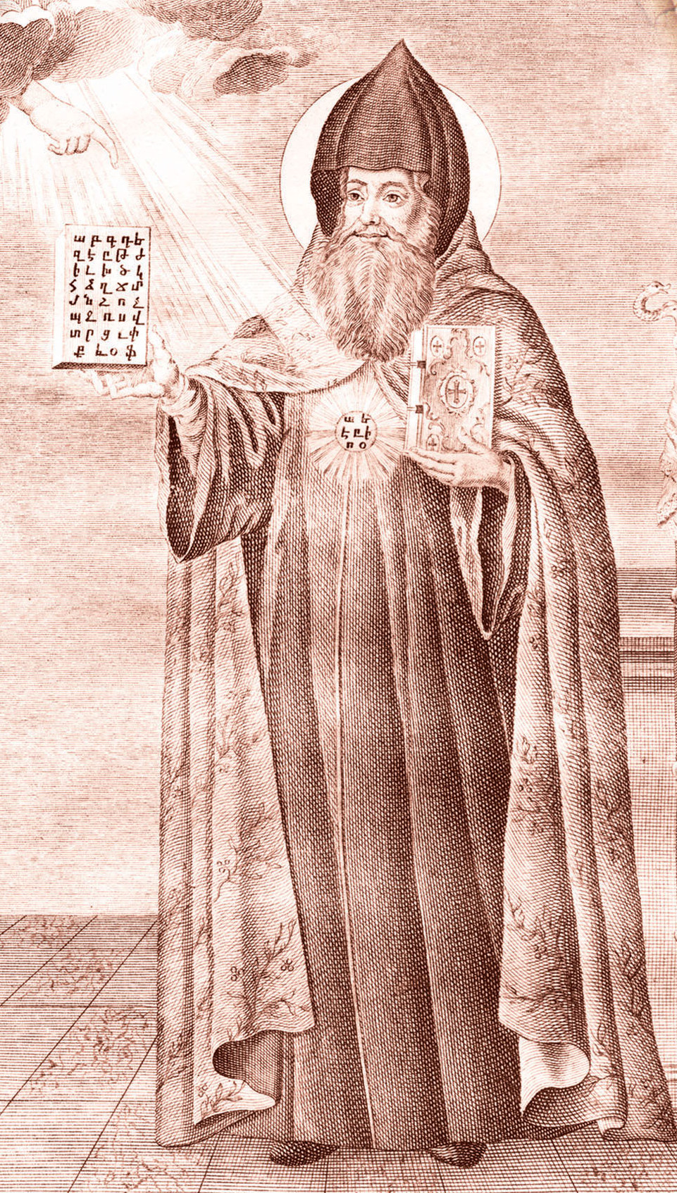 Սուրբ Մեսրոպ